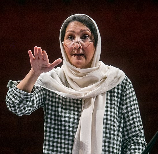 تمرین ارکستر ملی ایران به رهبری نزهت امیری